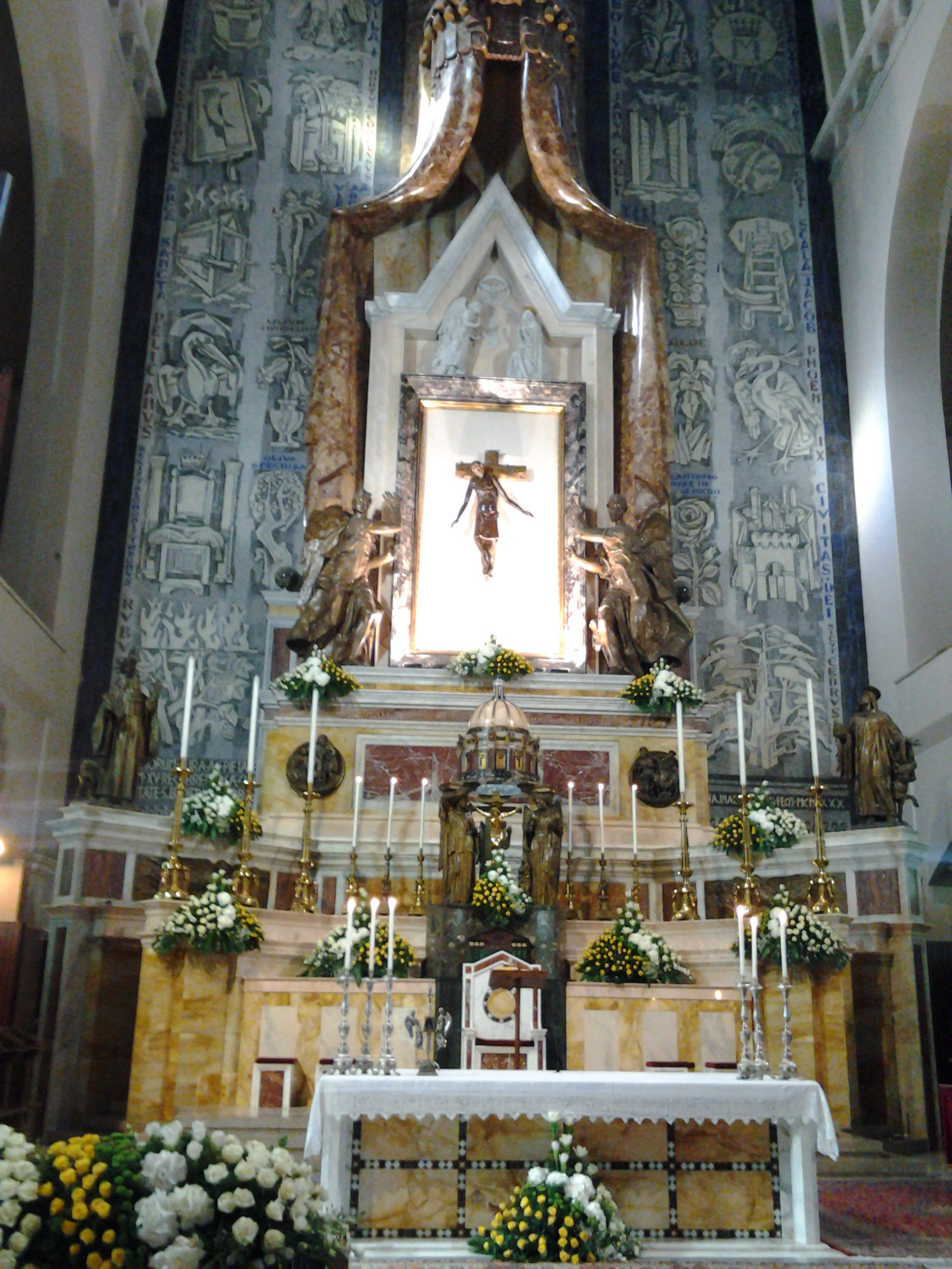 Crocifisso schiodato sull'altare maggiore della basilica cattedrale di Montevergien (già altare della Madonna)